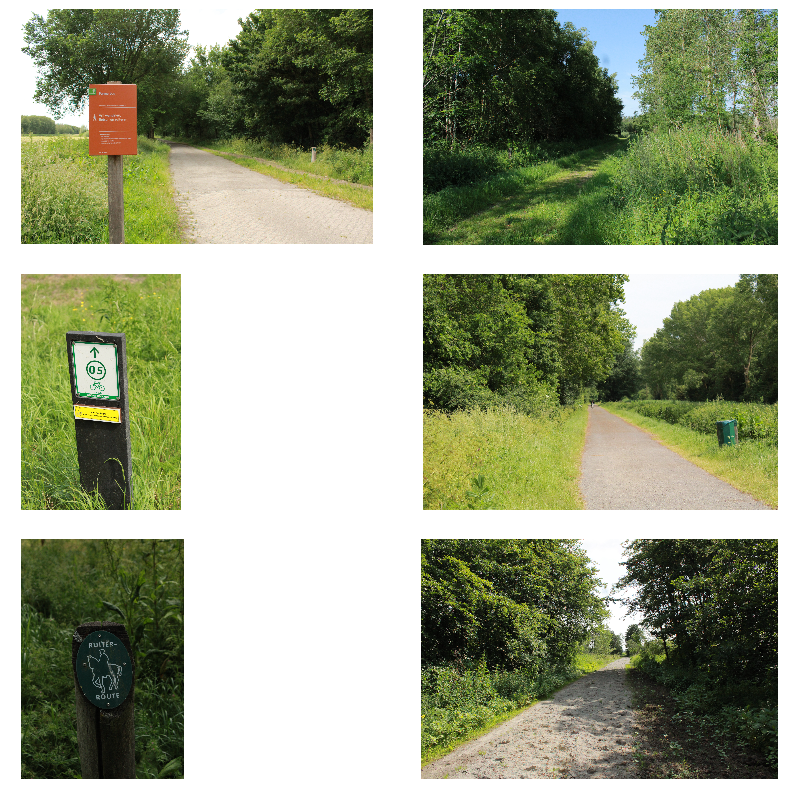 Wandel-, fiets- en ruiterpaden door het Purmerbos, respectievelijk van de bovenste rij naar de ondersterste rij foto’s.